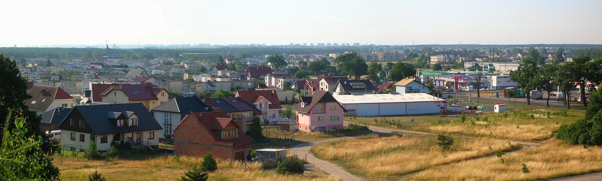 Osowa Góra w Bydgoszczy. Widok ze Zbocza Kruszyńskiego